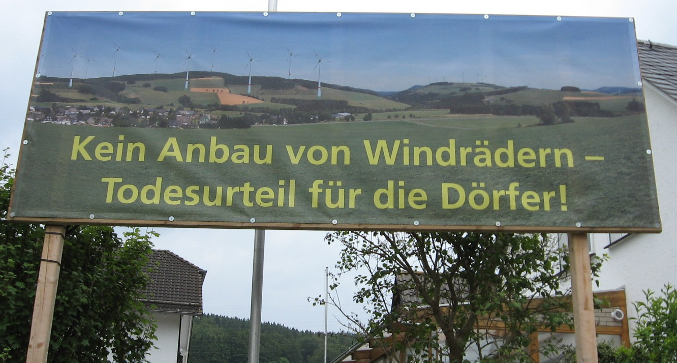 Protestplakat gegen Windkraft in Winterberg-Altenfeld (NRW, D).